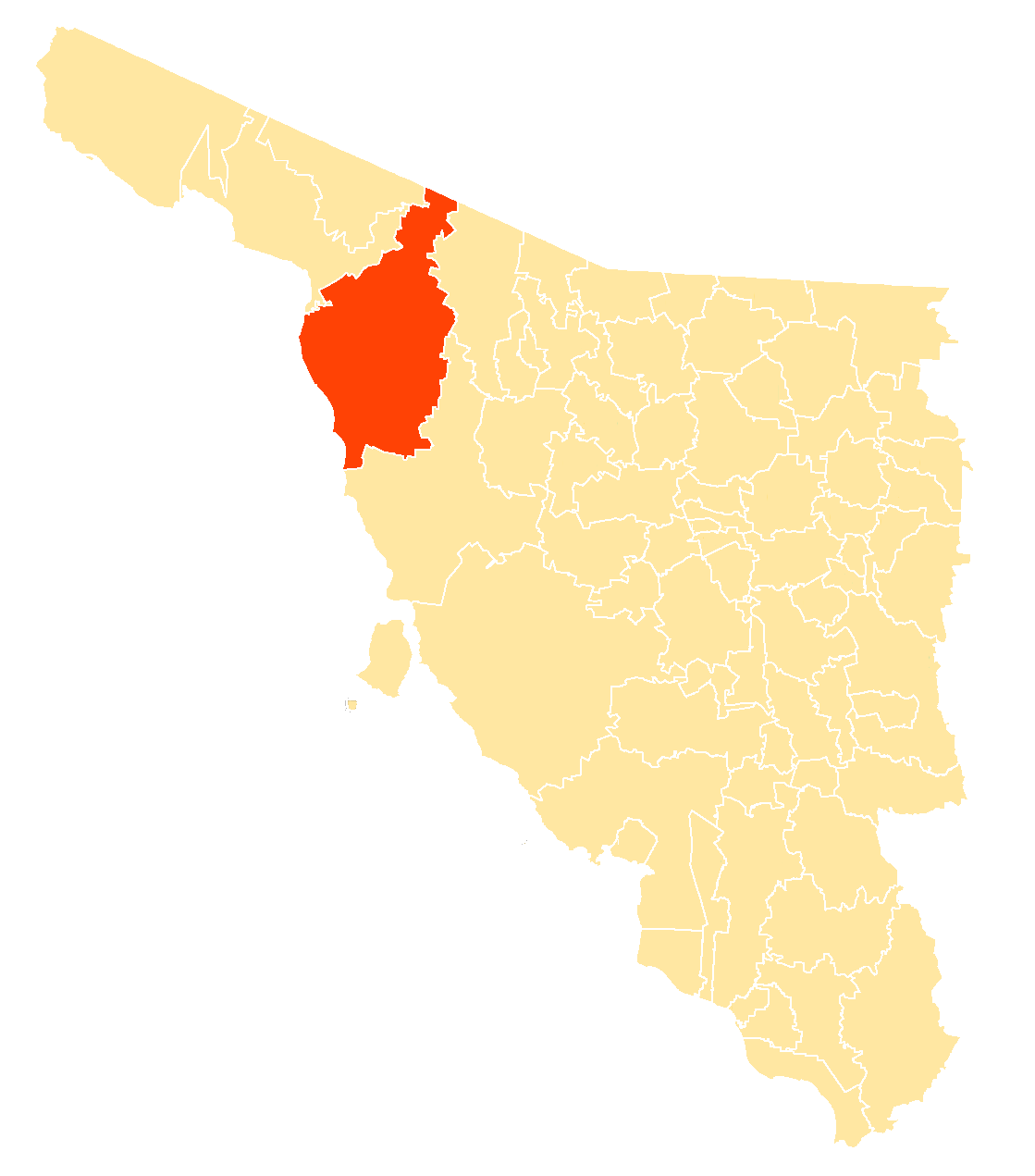 Municipio en Sonora, México.